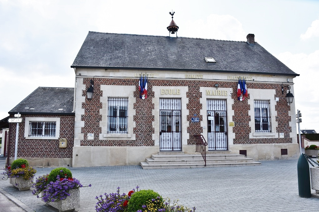 La marie